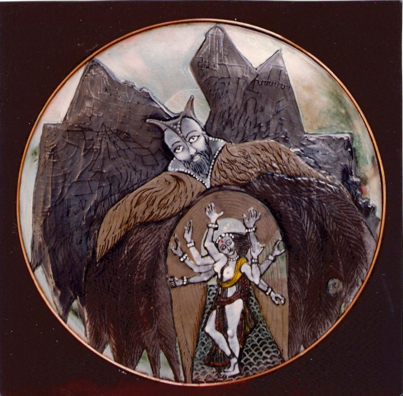 Festett zománc, tűzzománc, vörösréz lemezen